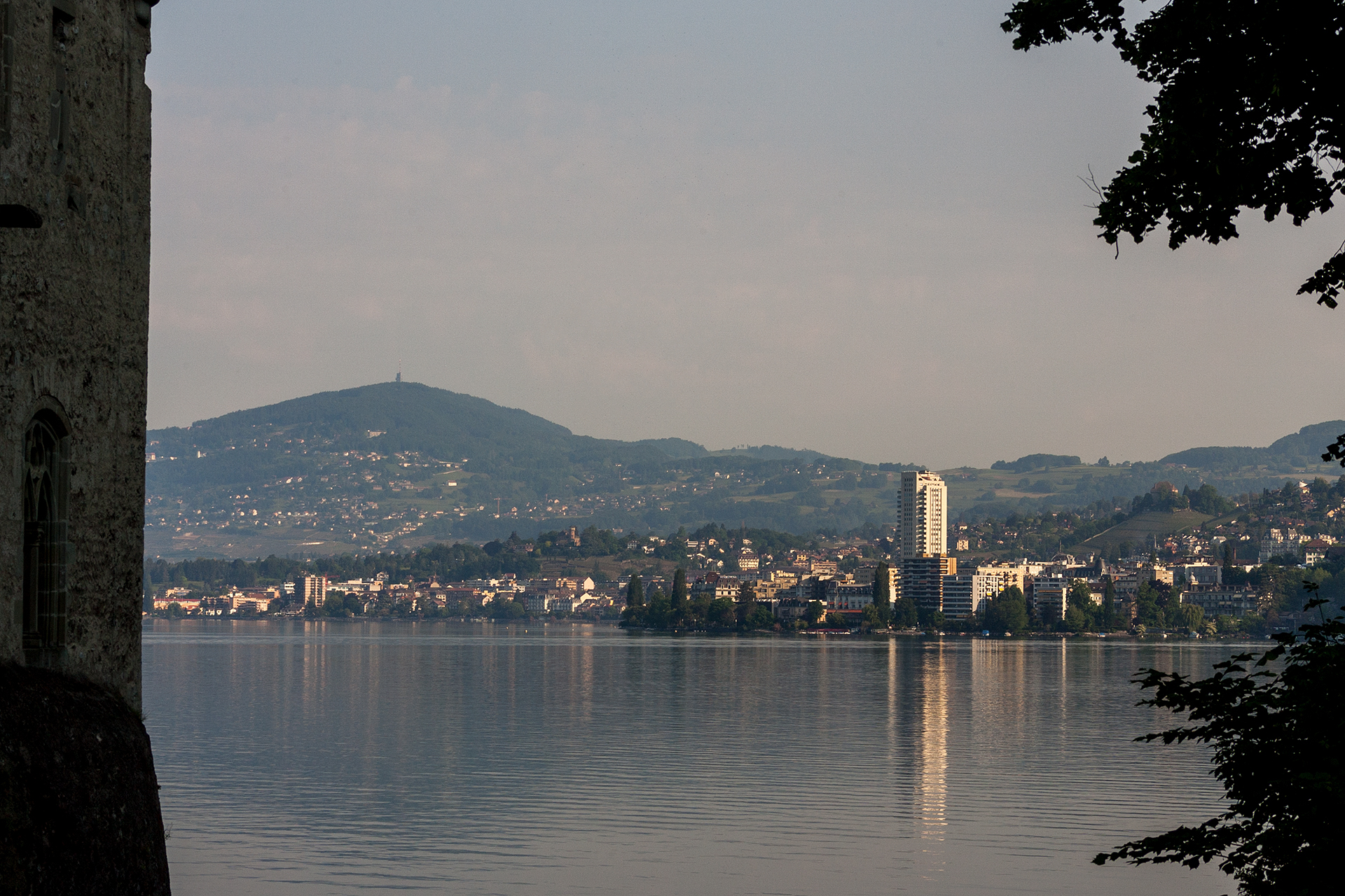 Blick vom Schloss Chillon nach Montreux (VD)